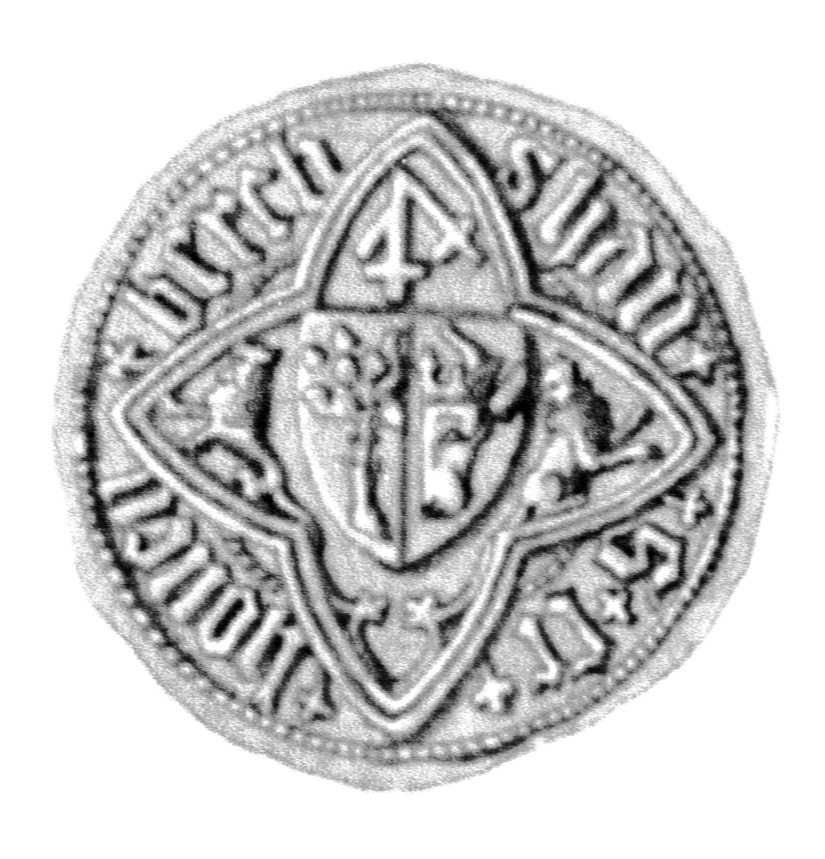 Siegel des Ratsmannes Johan(n) Schonenberg (Schonenberch) . Das Siegel stammt aus der Zeit um 1412. Siehe Emil Ferdinand Fehling: Lübeckische Ratslinie, Nr. 451 (Johann Schonenberg).